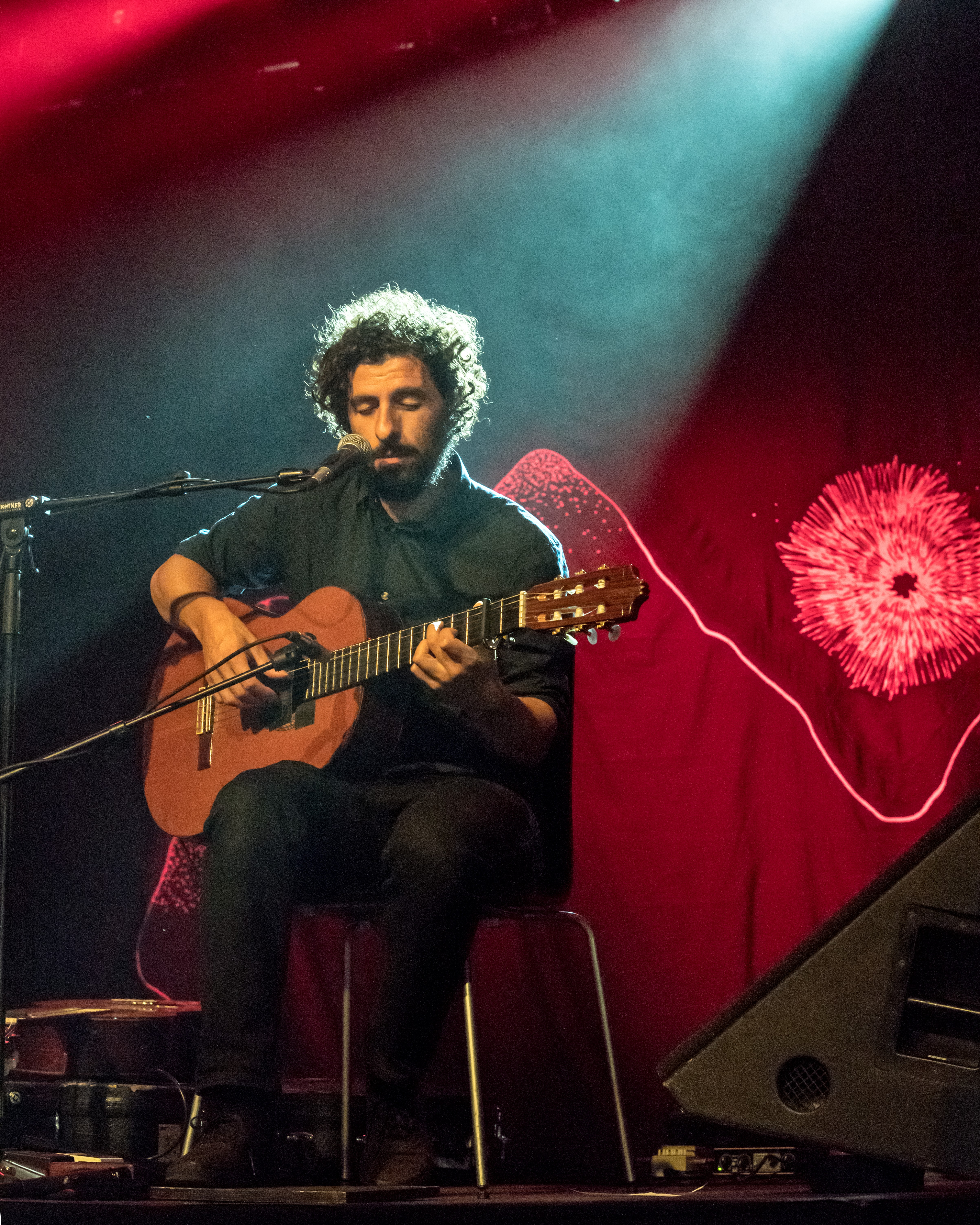 Bilder vom Zelt Musik Festival 2017 in Freiburg im Breisgau José González am 13.07.2017